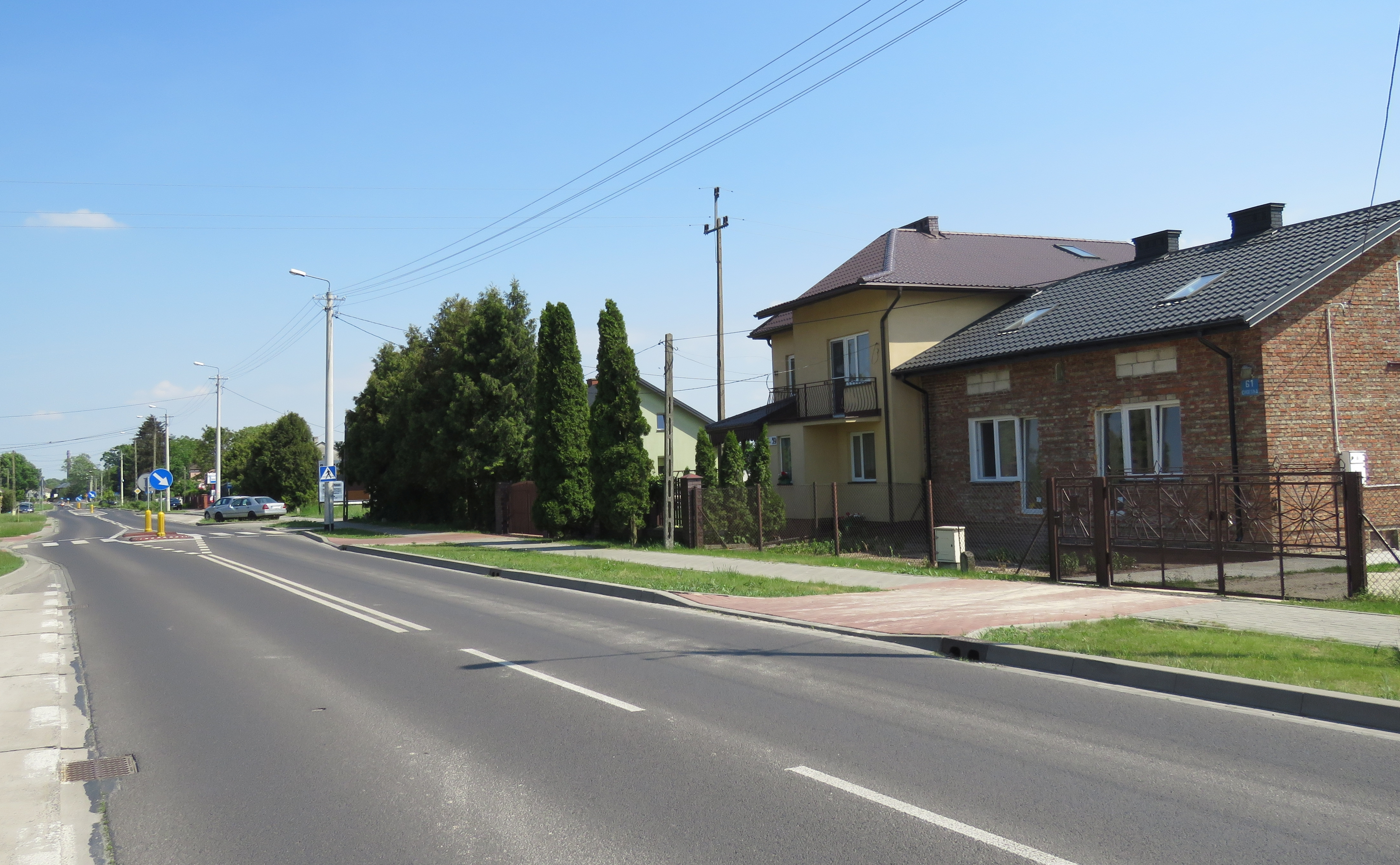 Plewniak gm. Leszno